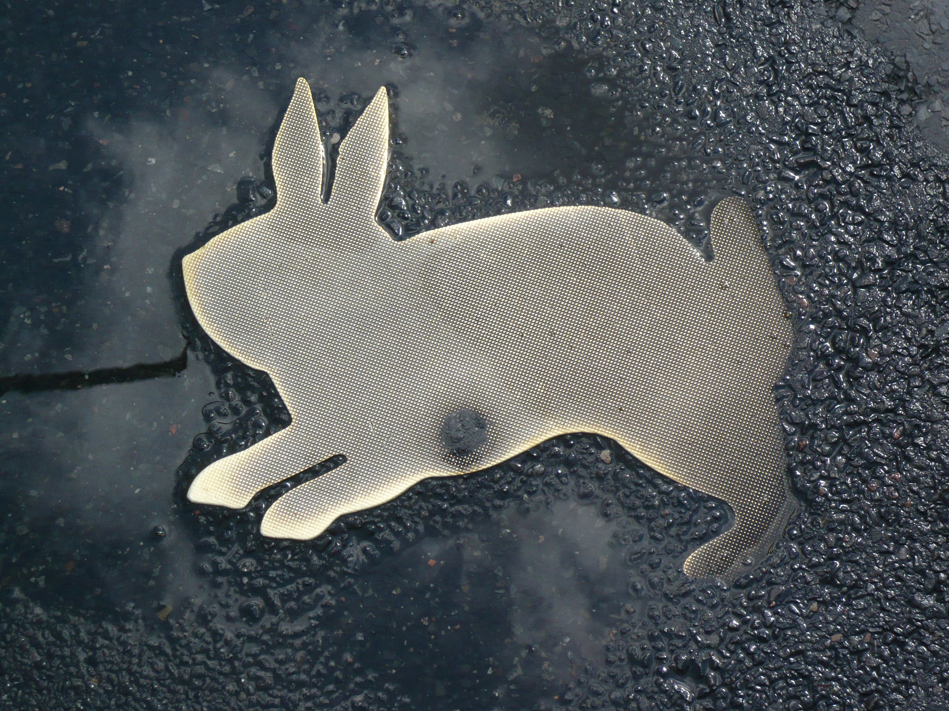 Kaninchen von Karla Sachse in Berlin-Mitte, Chausseestr.